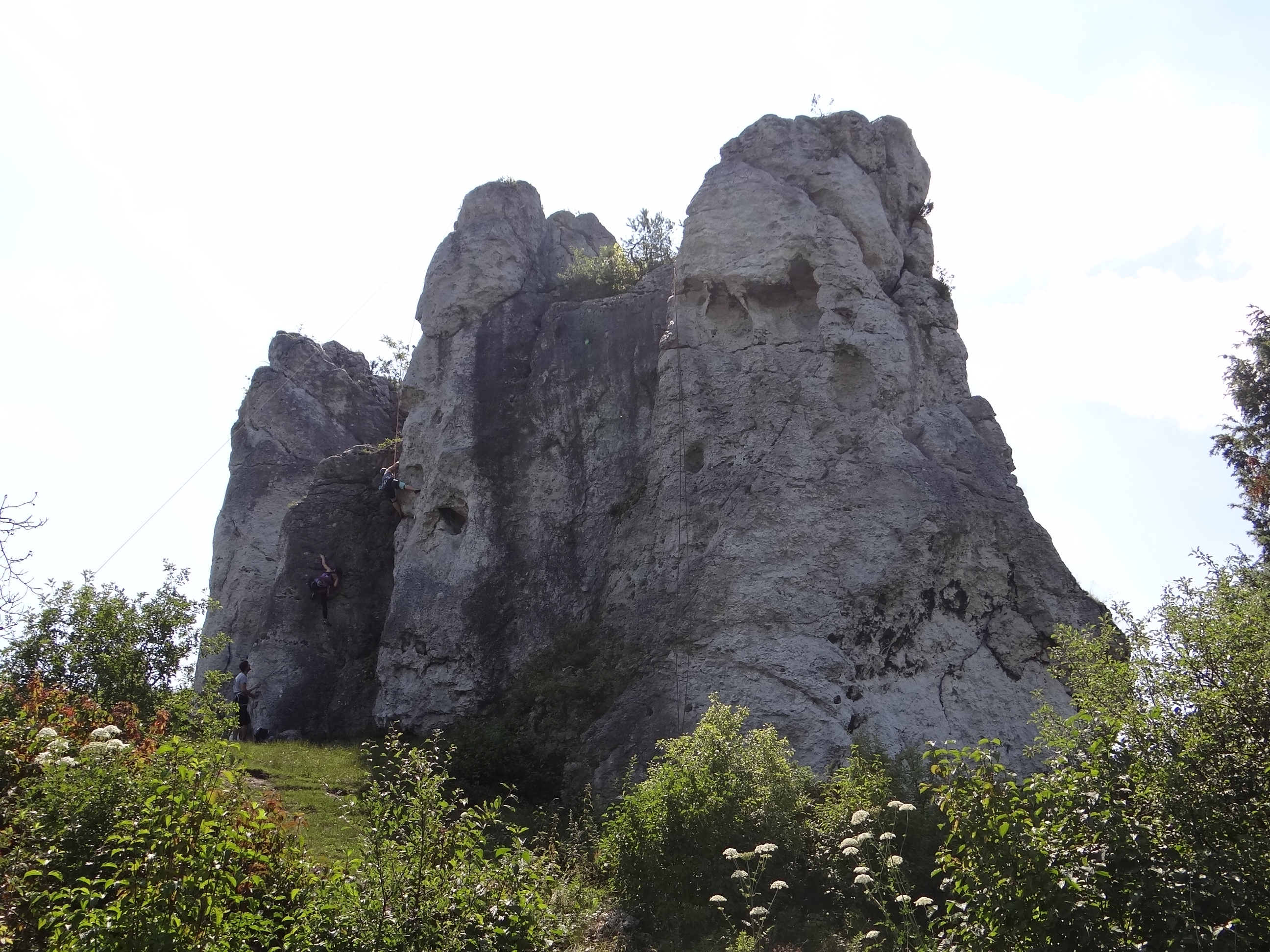 Skały Mirowskie. Grupa Trzech Sióstr